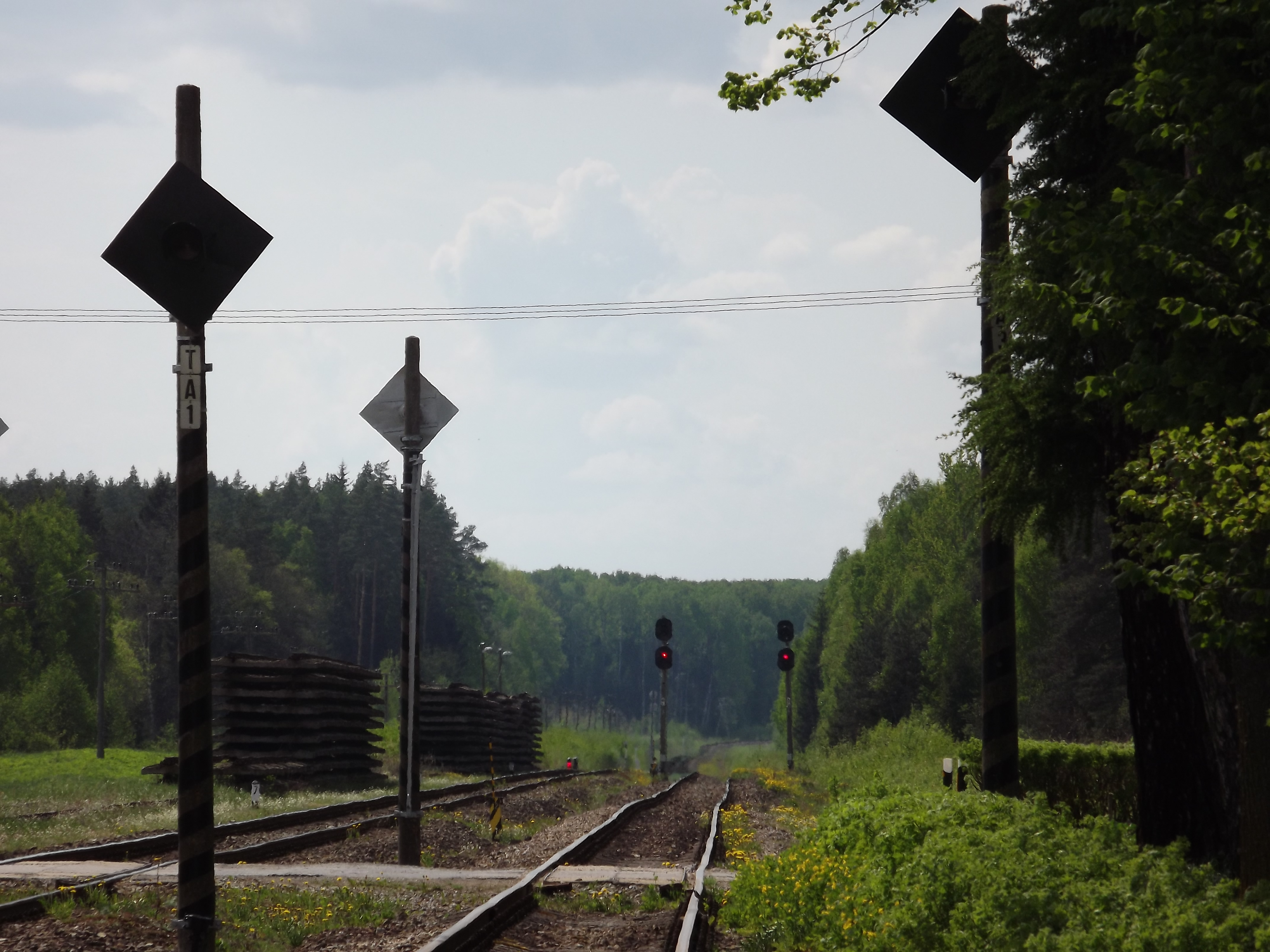 Karula raudteejaam